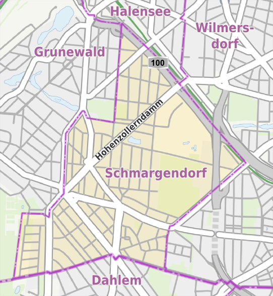 Übersichtskarte der Straßen und Ortslagen in Berlin-Schmargendorf